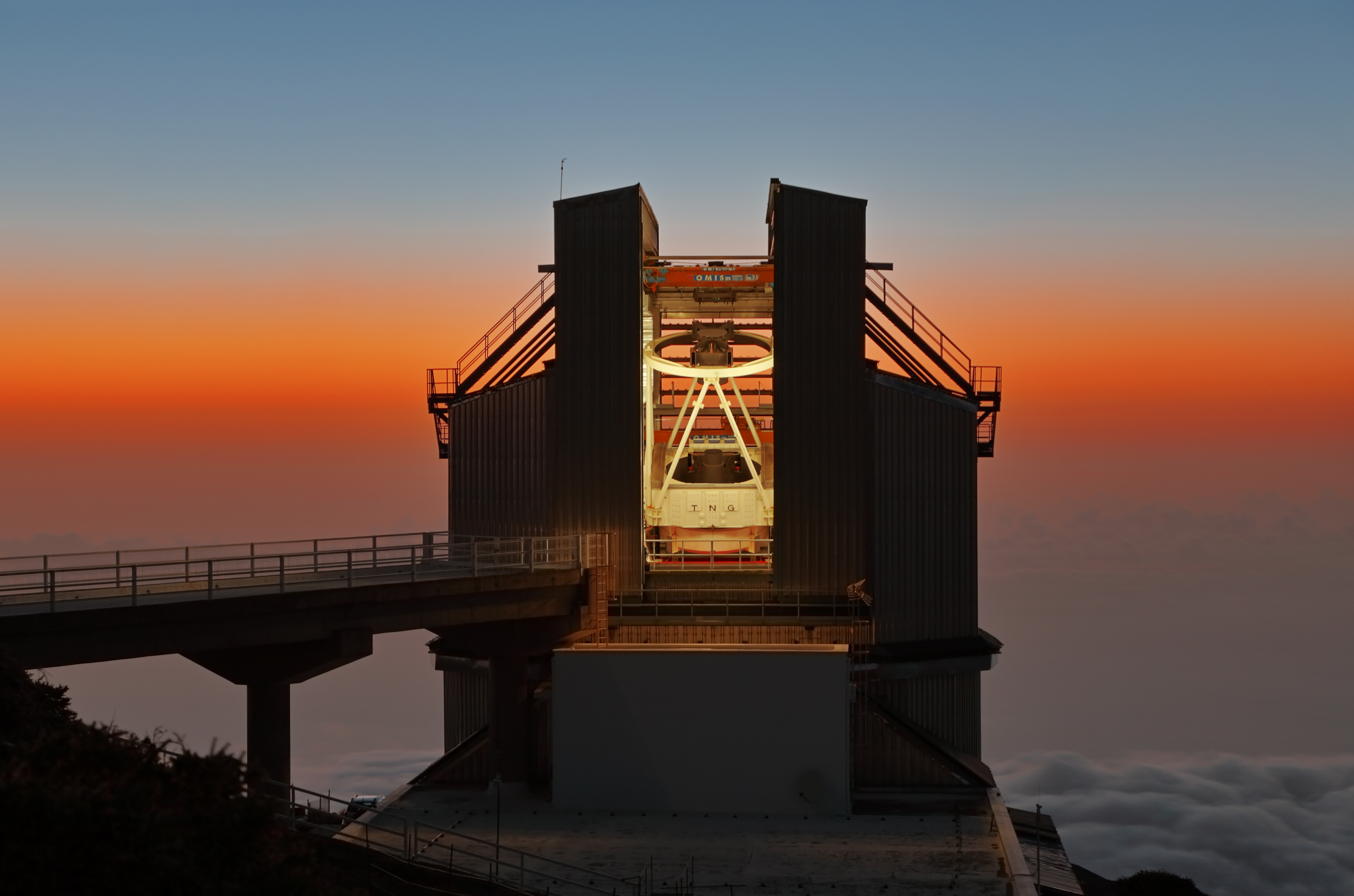 TNG at sunset; it is ready for a night of observations. The TNG (Telescopio Nazionale Galileo) is a 3.58-meter Italian telescope, located at the "Roque de los Muchachos" Observatory on the island of La Palma in the Canary Islands, Spain. The TNG is operated by the "Fundación Galileo Galilei" on behalf of the Italian National Institute of Astrophysics (INAF). Image taken on September 24, 2012 at the Roque de Los Muchachos Observatory.